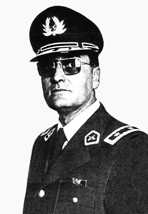 General de Carabineros, Sr. Germán Segundo Campos Vásquez